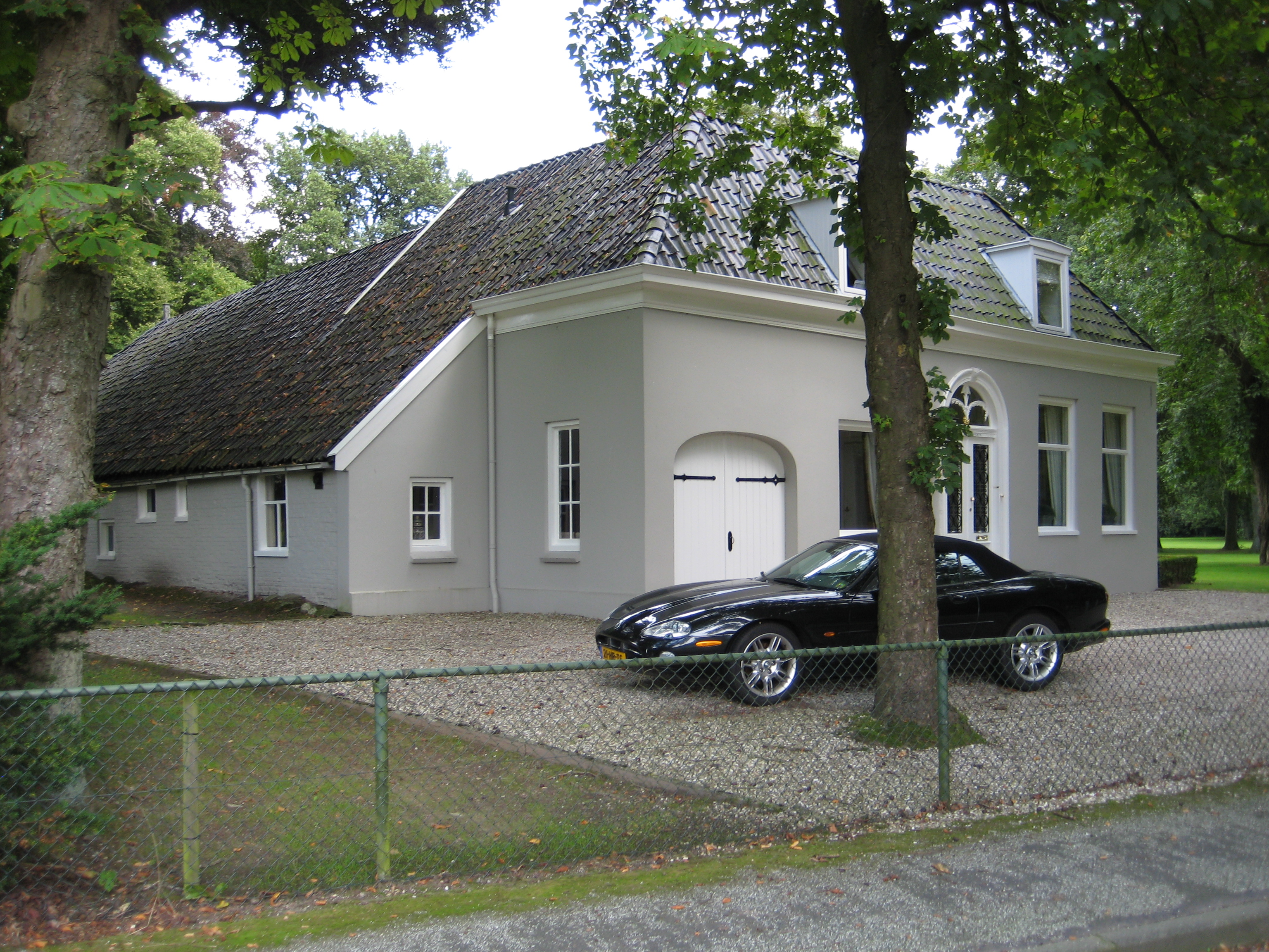 Woonhuis en schuur